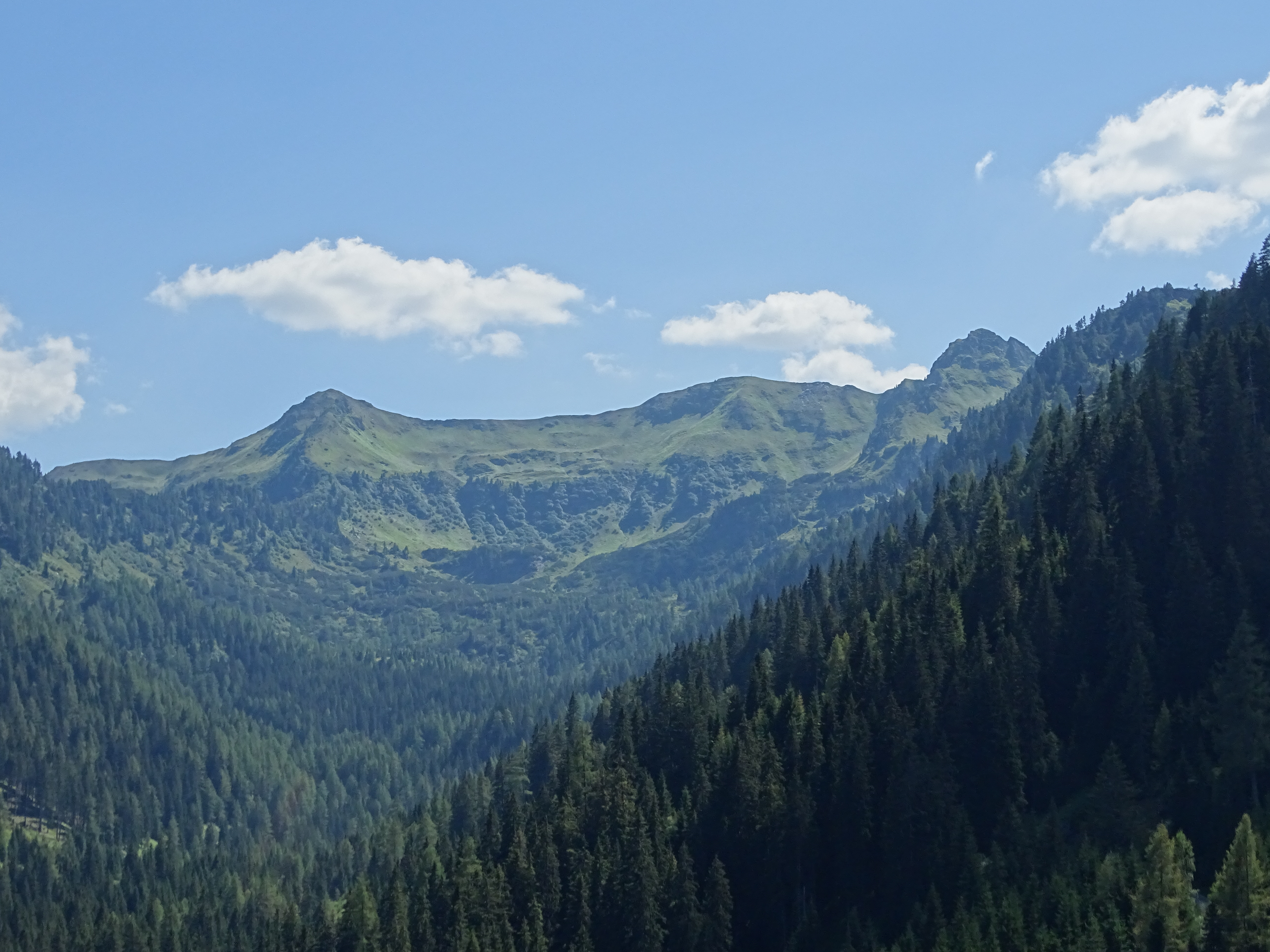 Die Plannerseekarspitze (links) und die Mittlere Gstemmerspitze (rechts) an der Gemeindegrenze zwischen Aigen im Ennstal und Irdning-Donnersbachtal